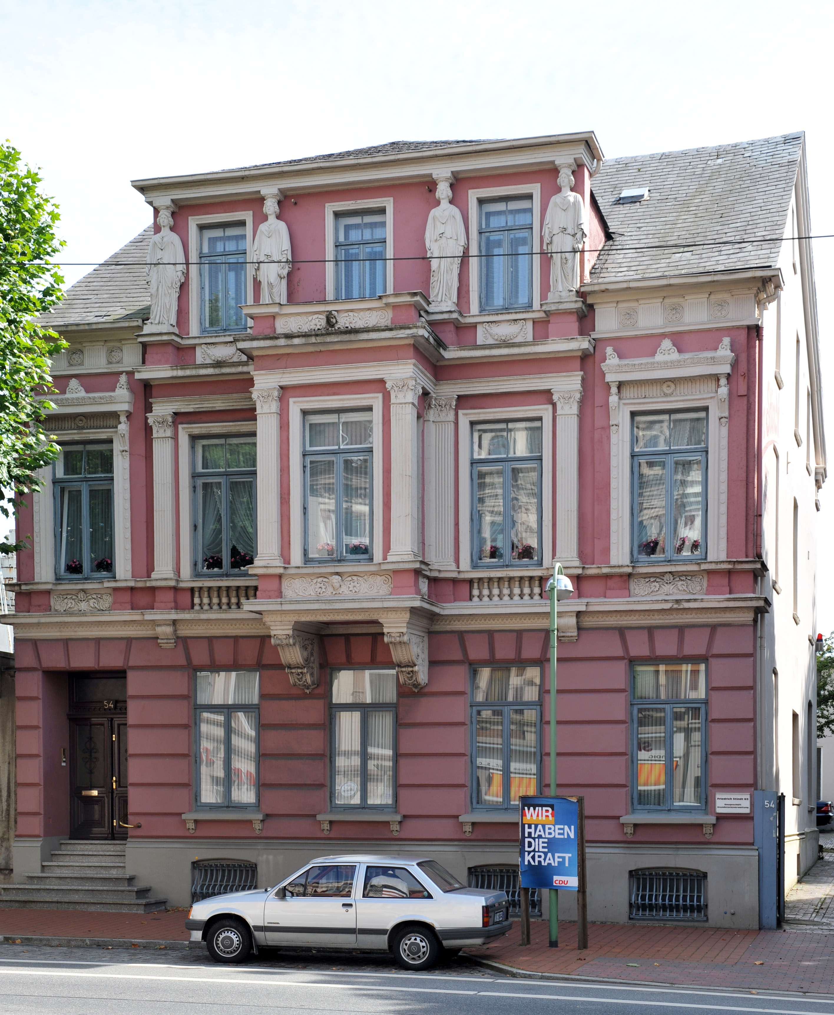 Historical building in Bremerhaven, northern Germany Wohnhaus, Hafenstraße 54, um 1880 Das abgebildete Objekt ist ein geschütztes Kulturdenkmal in der Freien Hansestadt Bremen, mit der Nr. 1568 beim Landesamt für Denkmalpflege registriert.